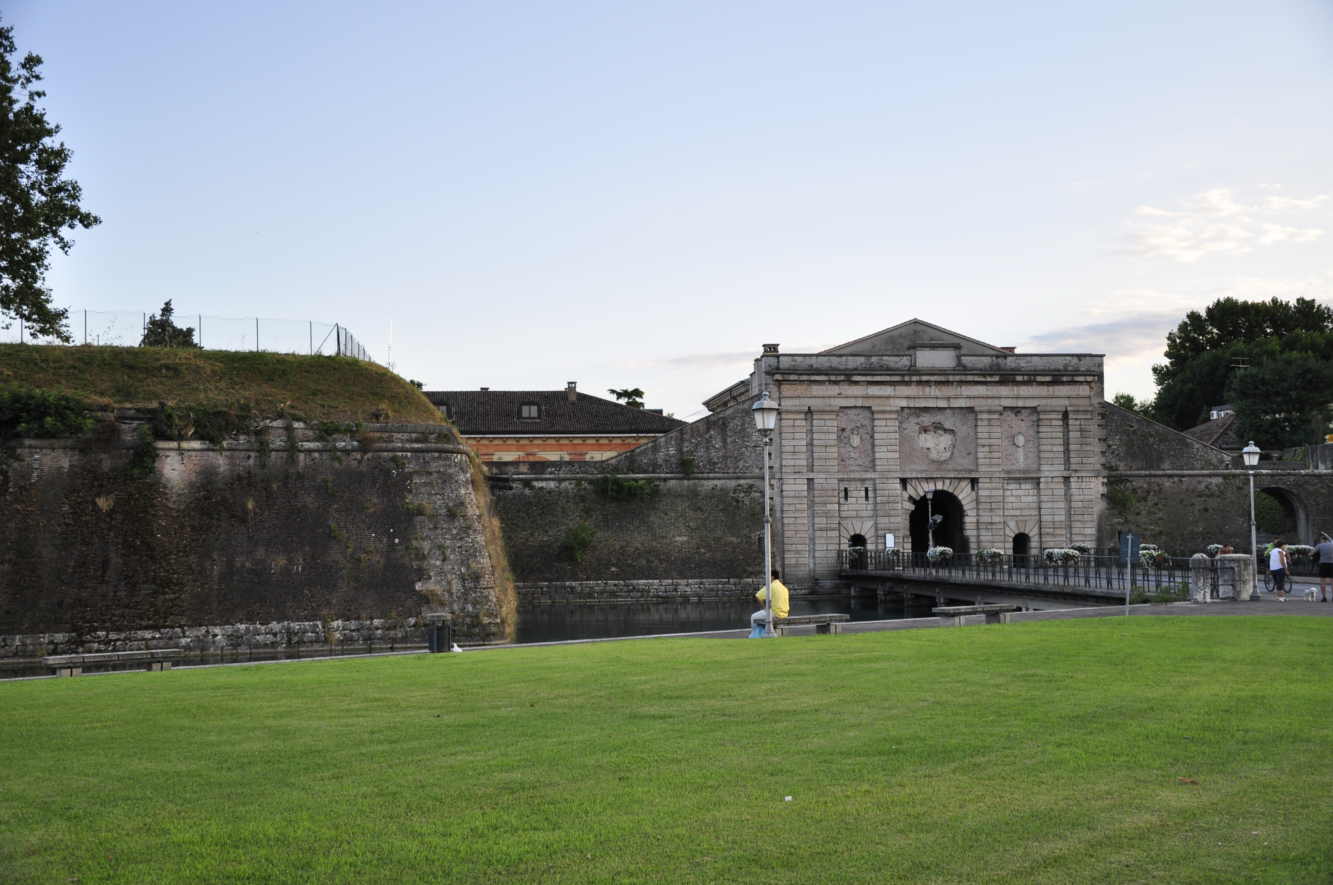 Venezianische Festung Peschiera del Garda, Gardasee, Italien